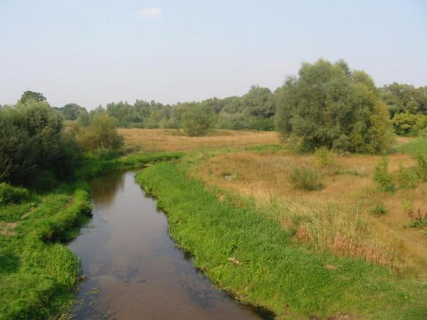 Włodawka River near Włodawa city in Poland Autor Piotr Trochymiak aka Pepson Wlodawka